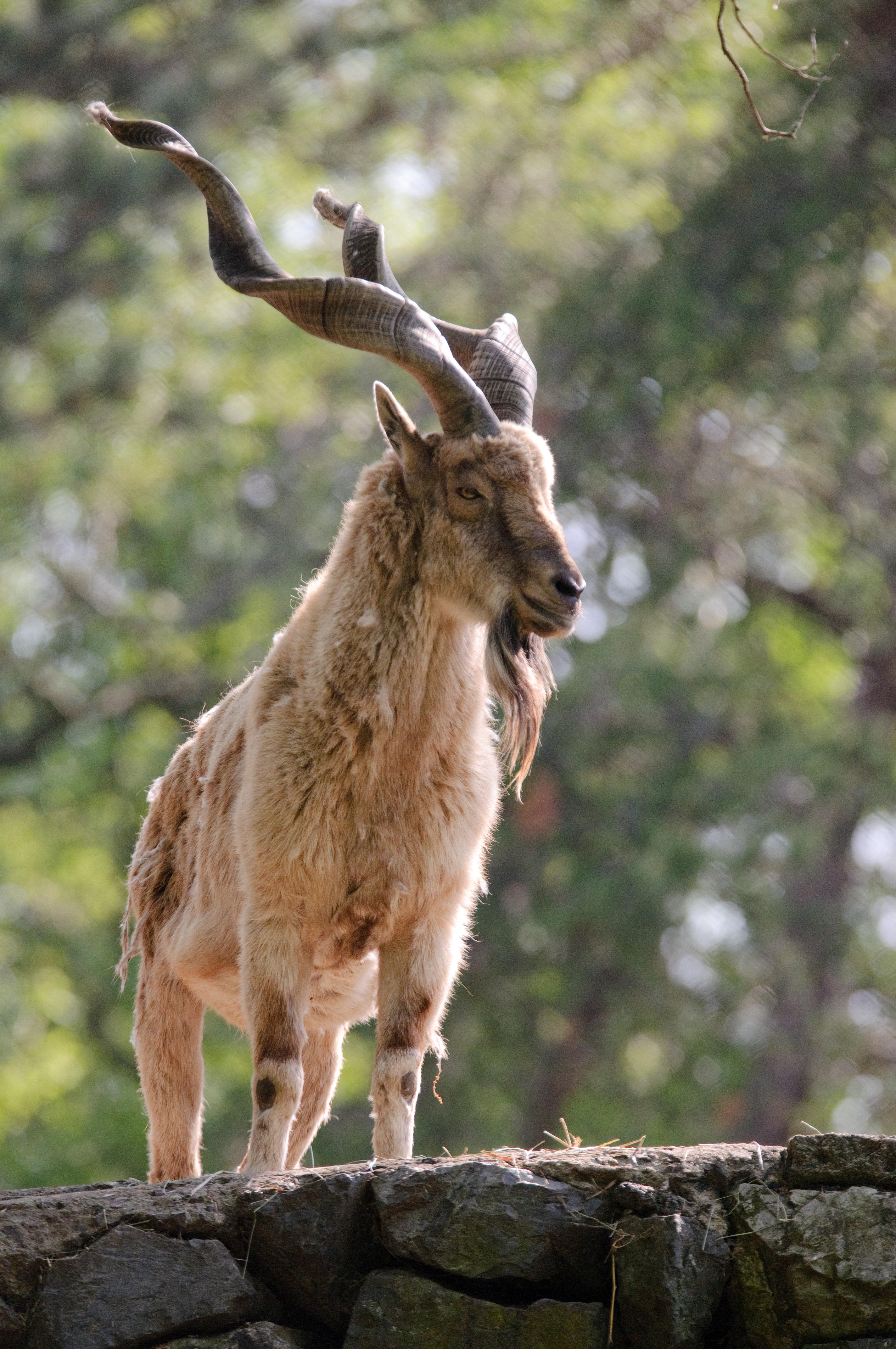 Markhor Horns